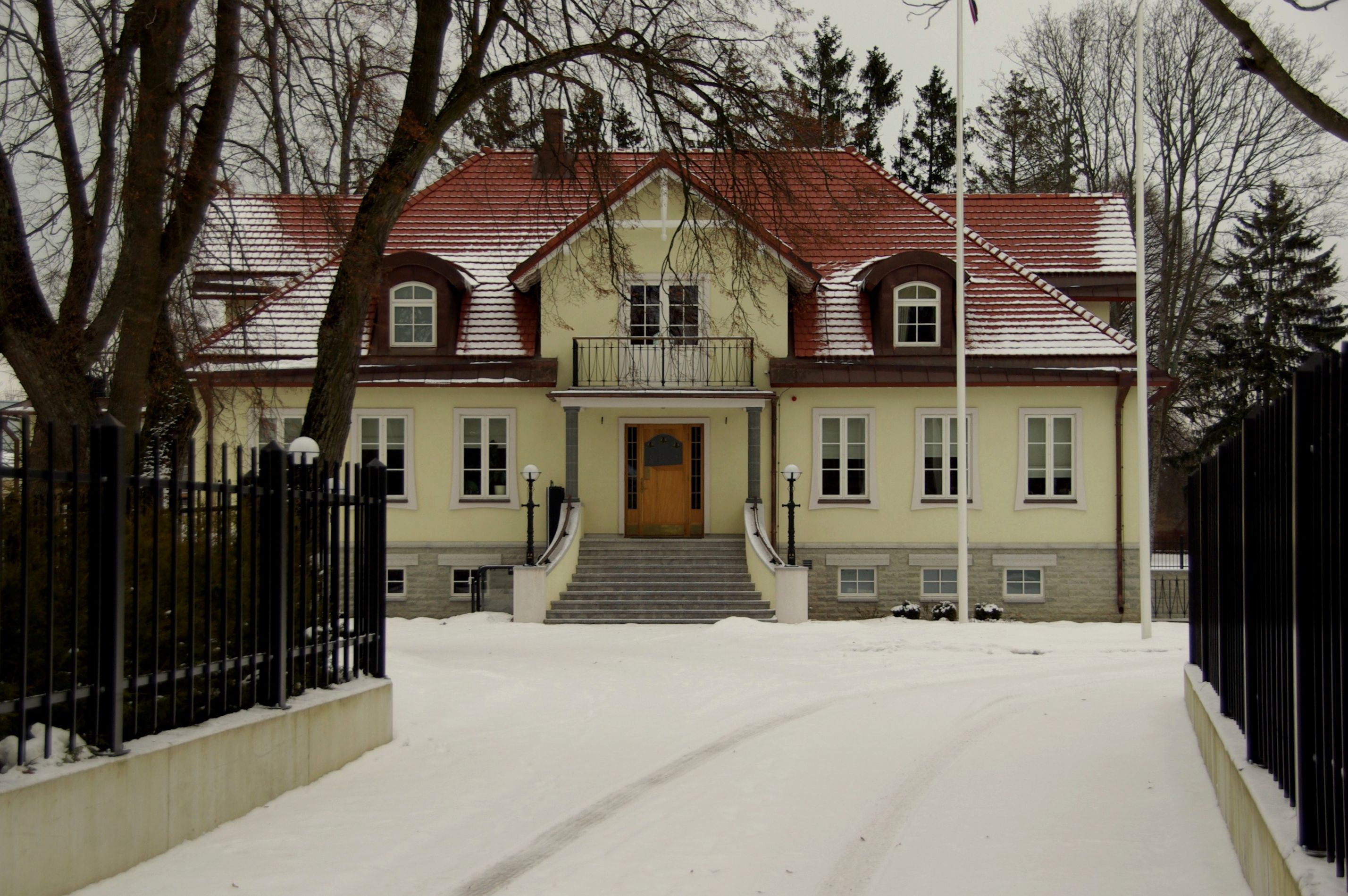 Jääb Kose tee ja Vabaõhukooli tee ristumiskoha juurde Tallinnas